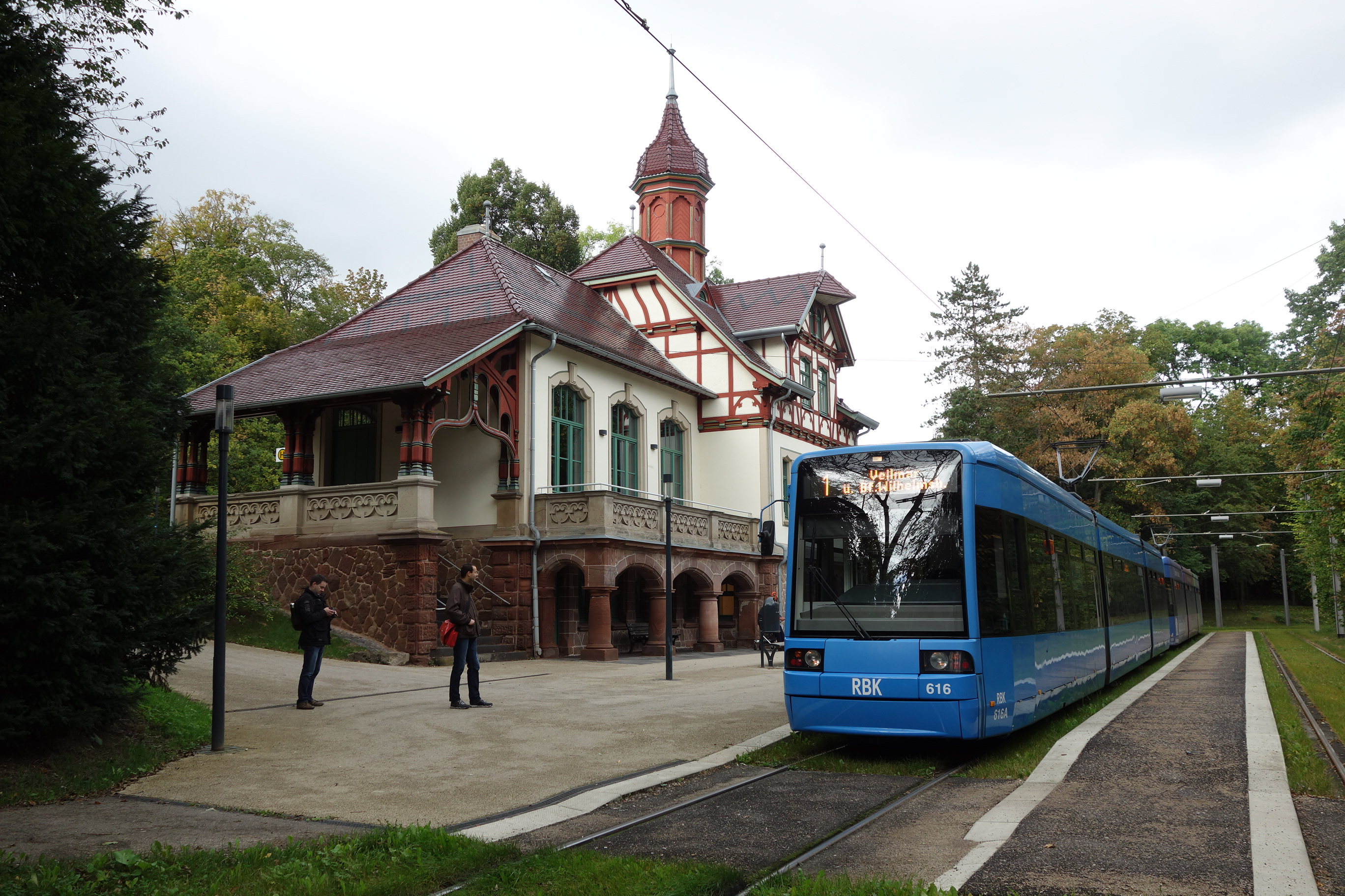 Kassel, Bergpark Wilhelmshöhe, Altes Stationsgebäude, Haltestelle Wilhelmshöhe (Park) mit Bombardier Flexity Classic (8NGTW)